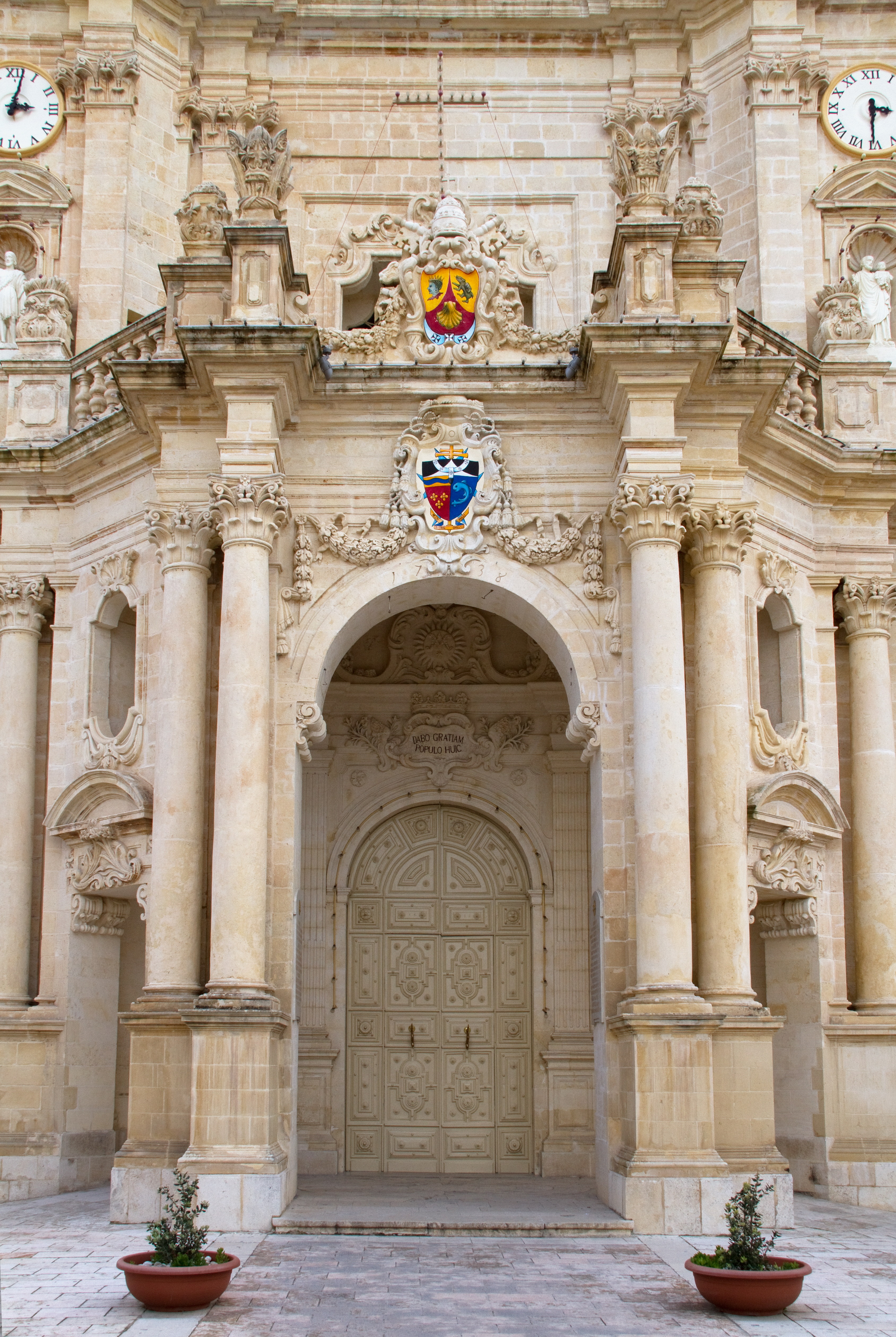 Zabbar Church